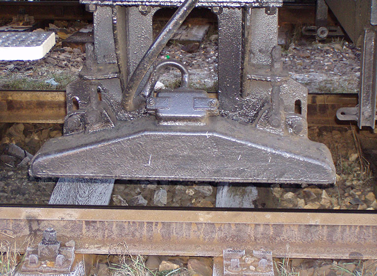 polnische Zugsicherungssystem SHP